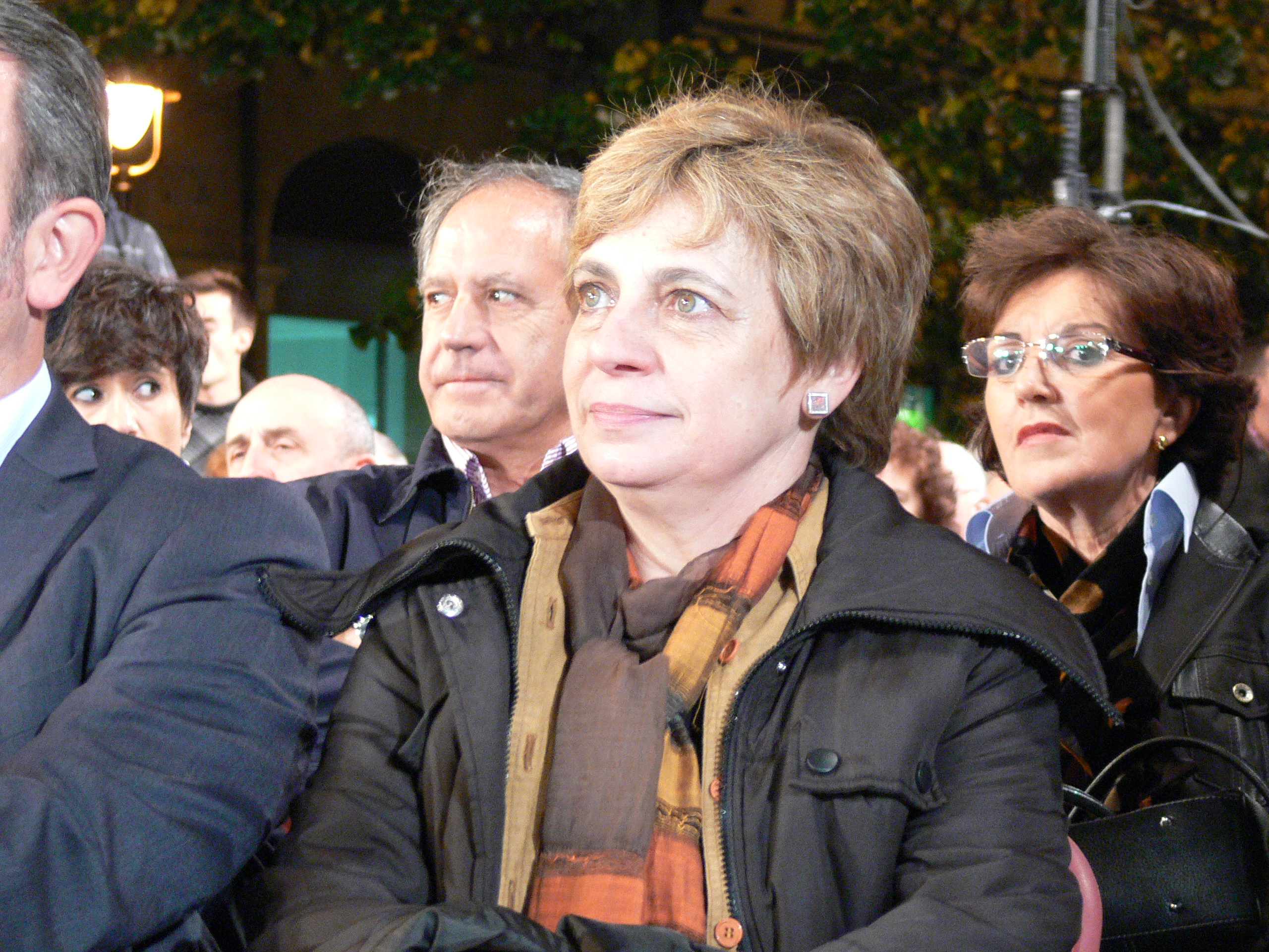 Miren Azkarate Antigua auzoko mitin batean.